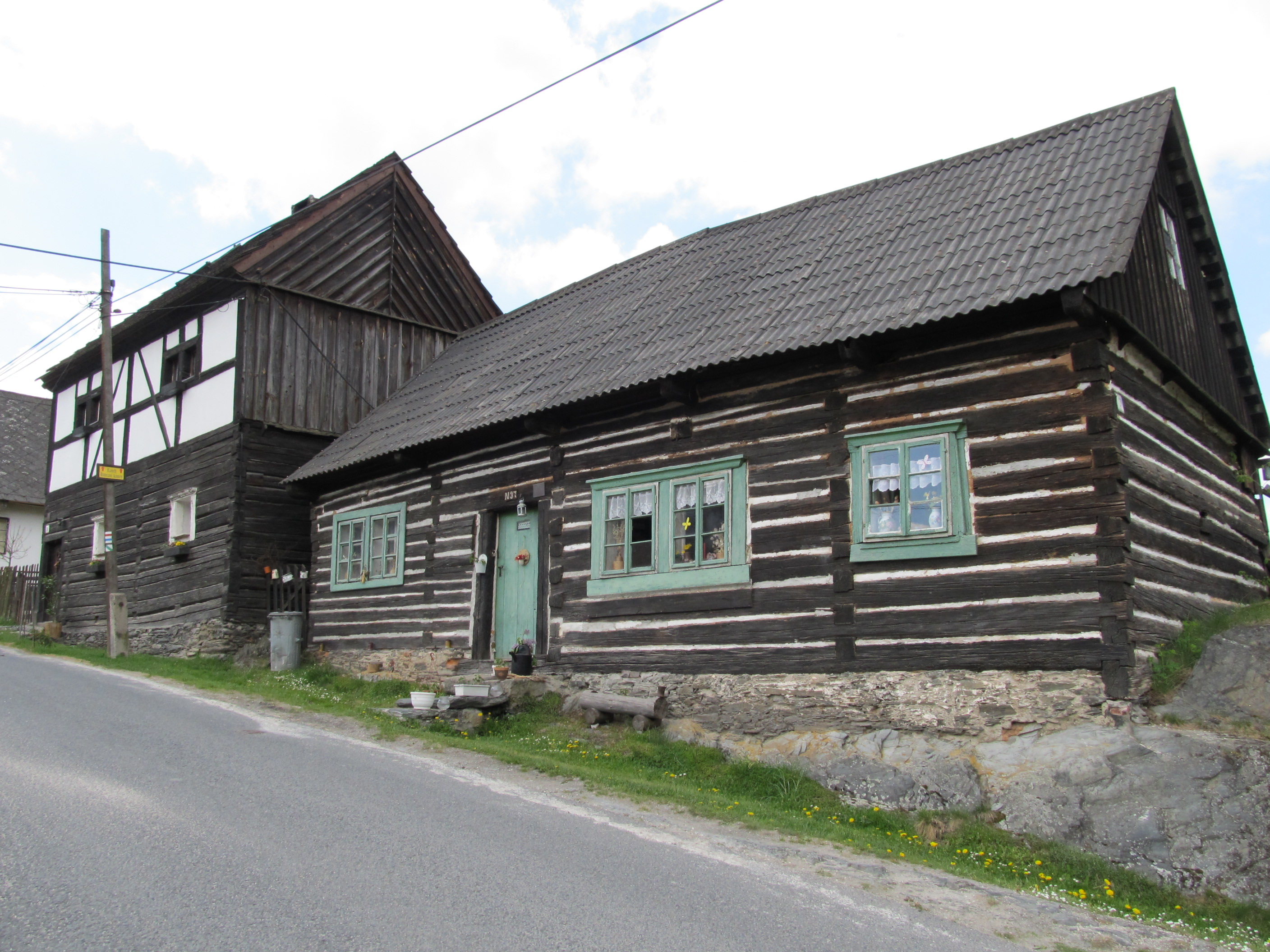 Rabštejn - chudobinec (č. 37) a špitál (č. 38)